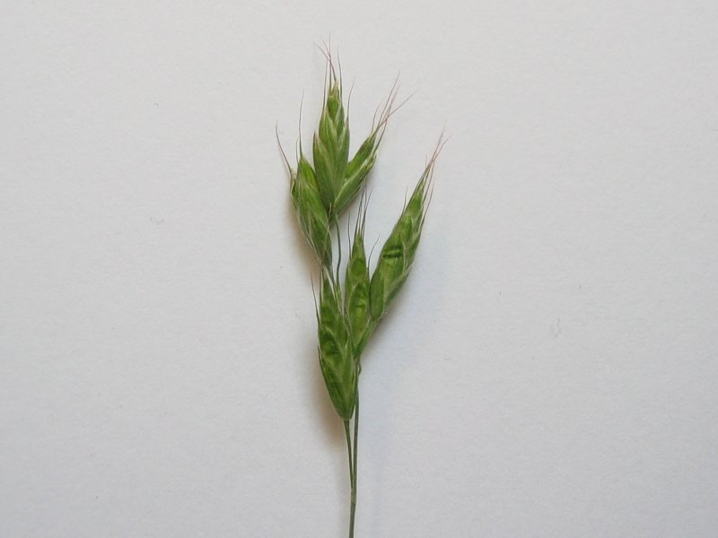 Ähre der Weichen Trespe Bromus hordeaceus